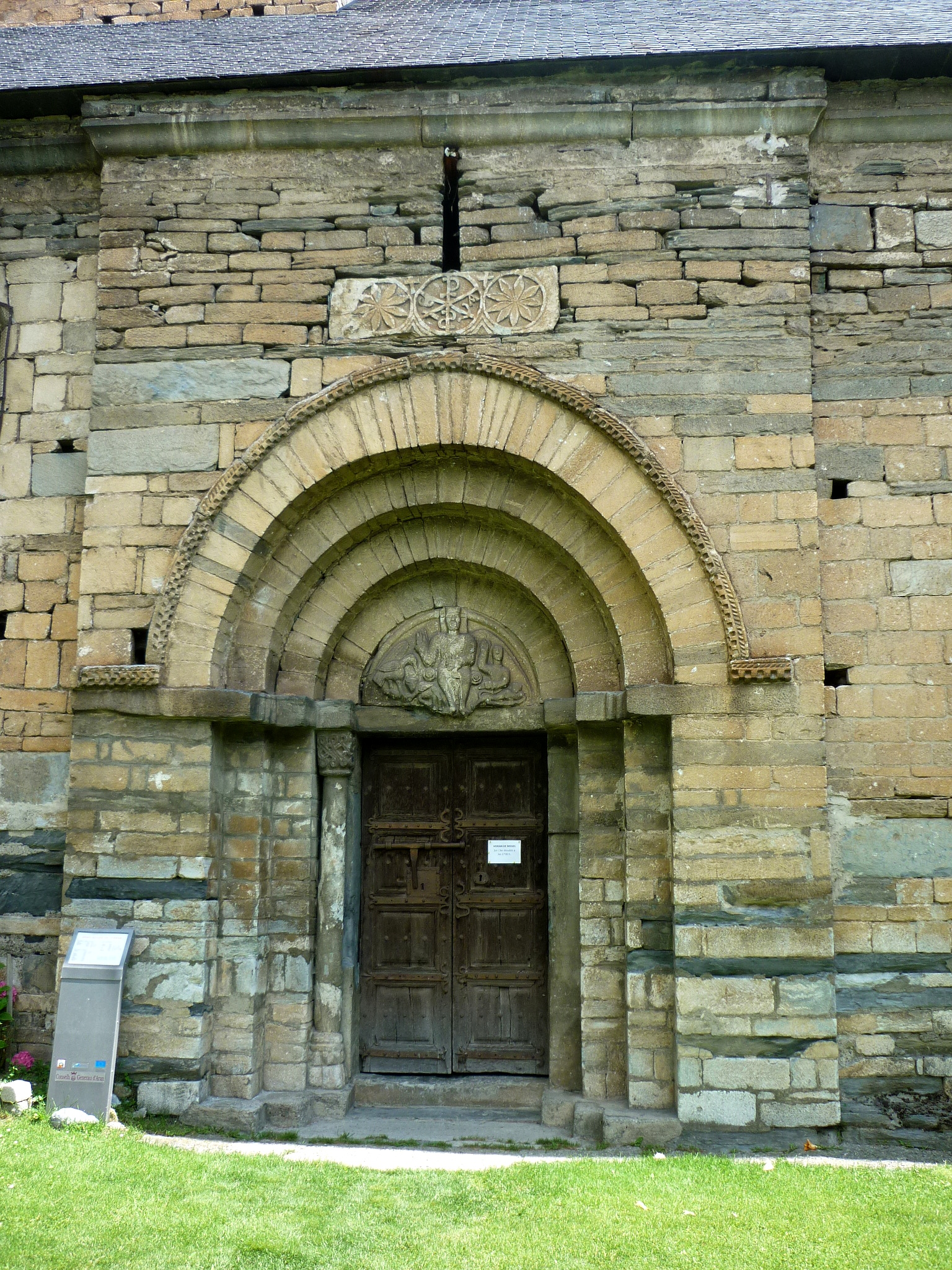 Esglesia de Sant Feliu de Vilac (Vielha e Mijaran): portada romànica